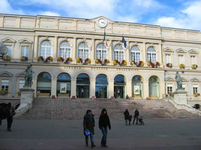 Hotel de Ville de Saint Etienne